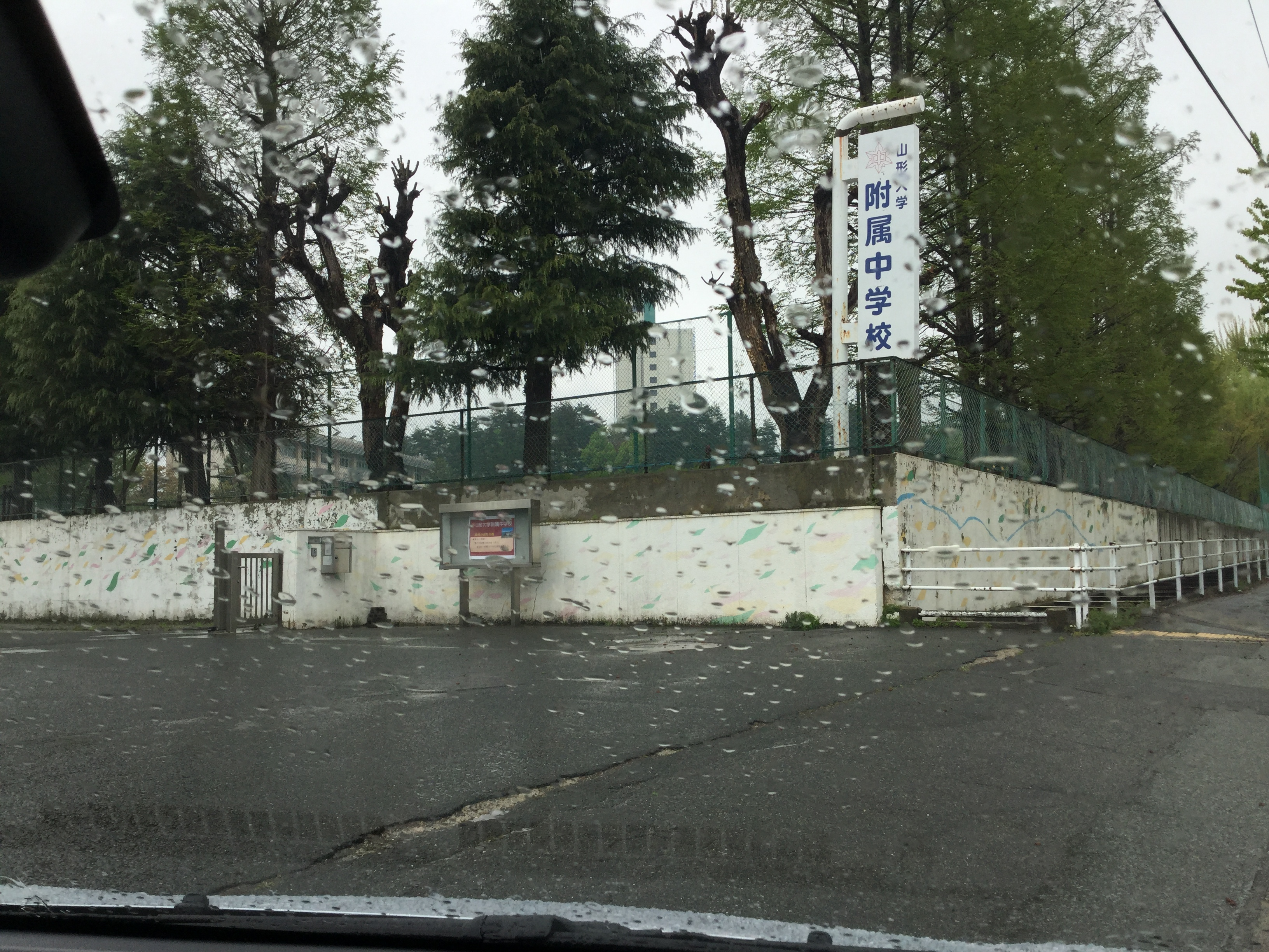 山形大学附属中学校校門